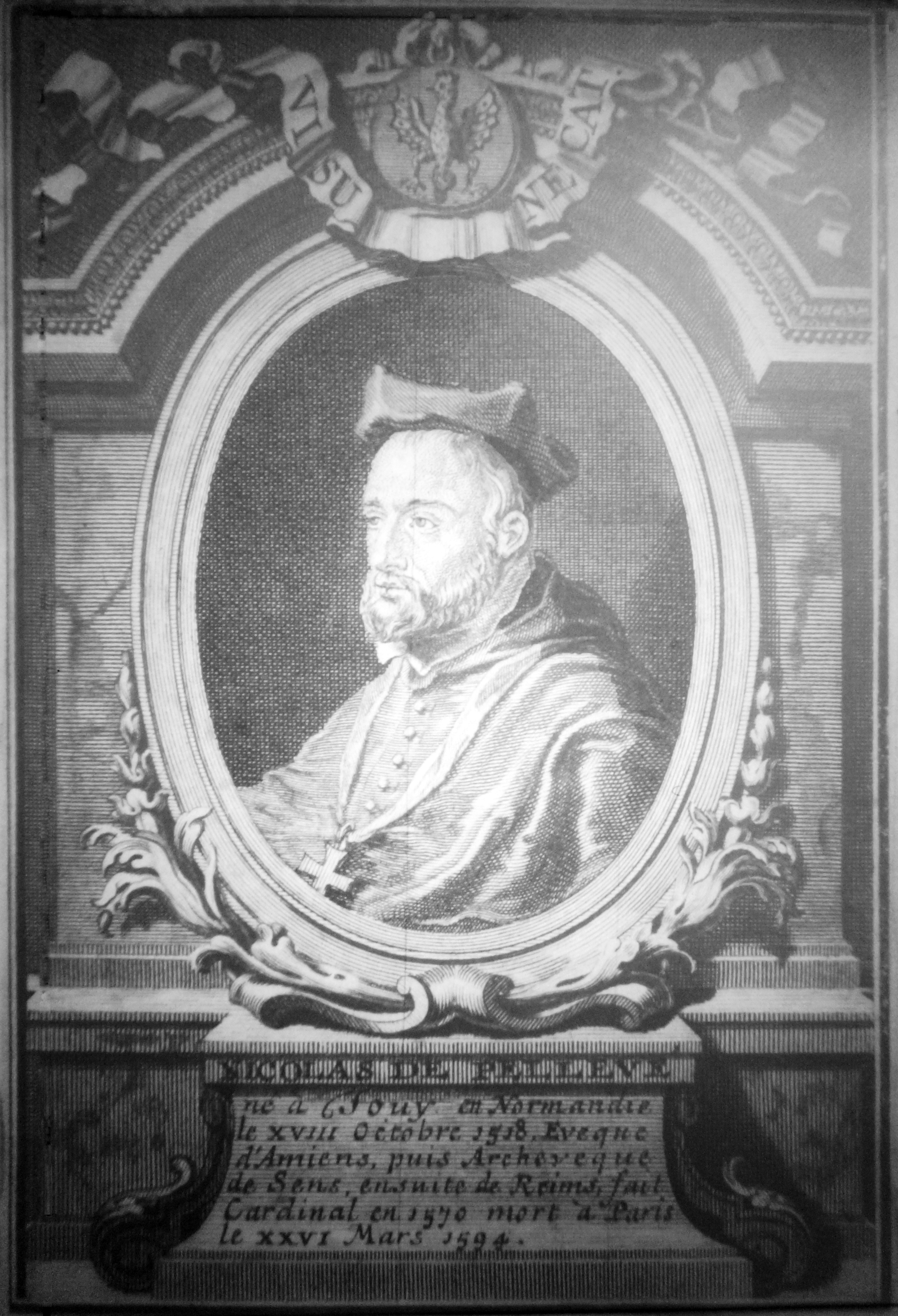 Nicolas de Pellevé.